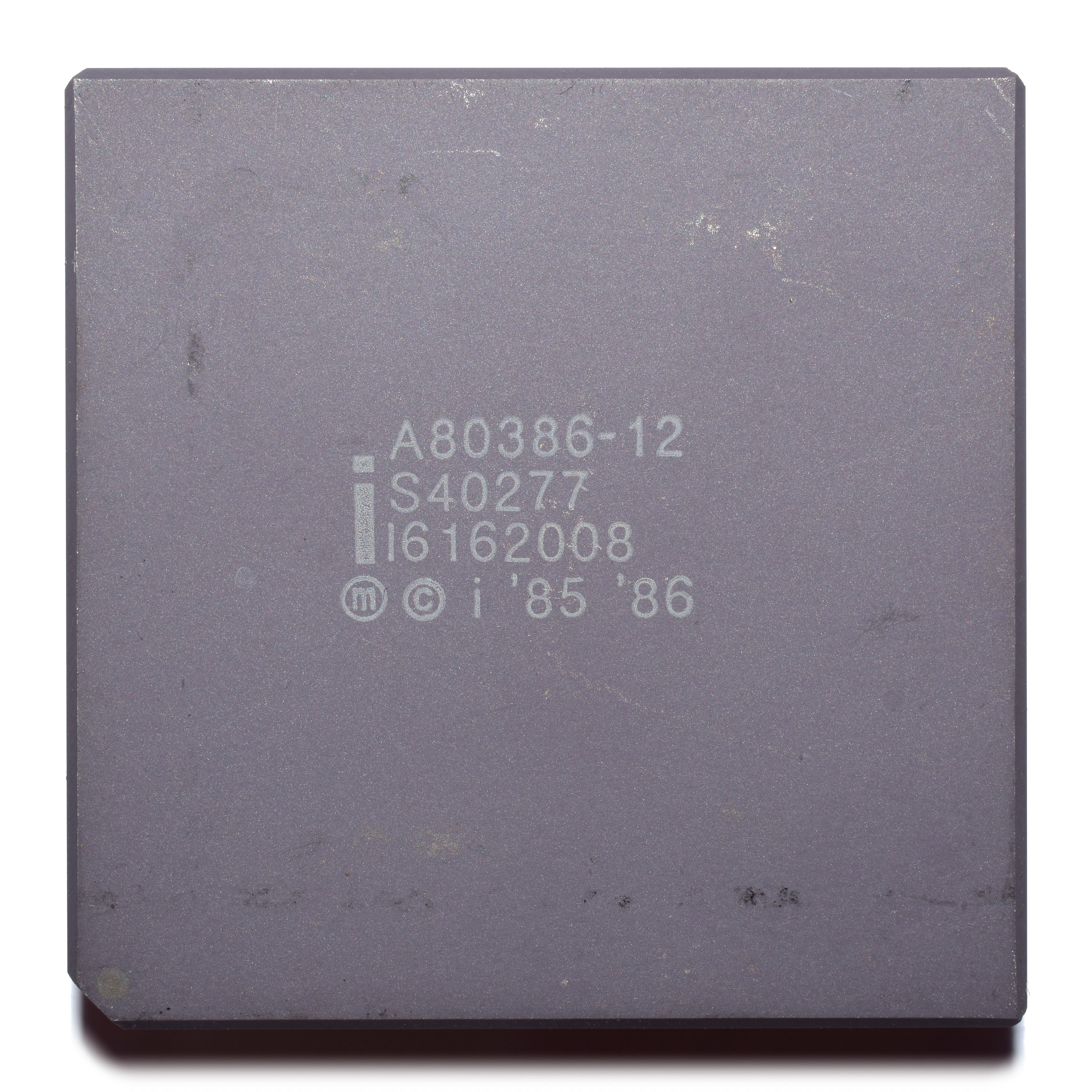 Procesoro Intel A80386-12.